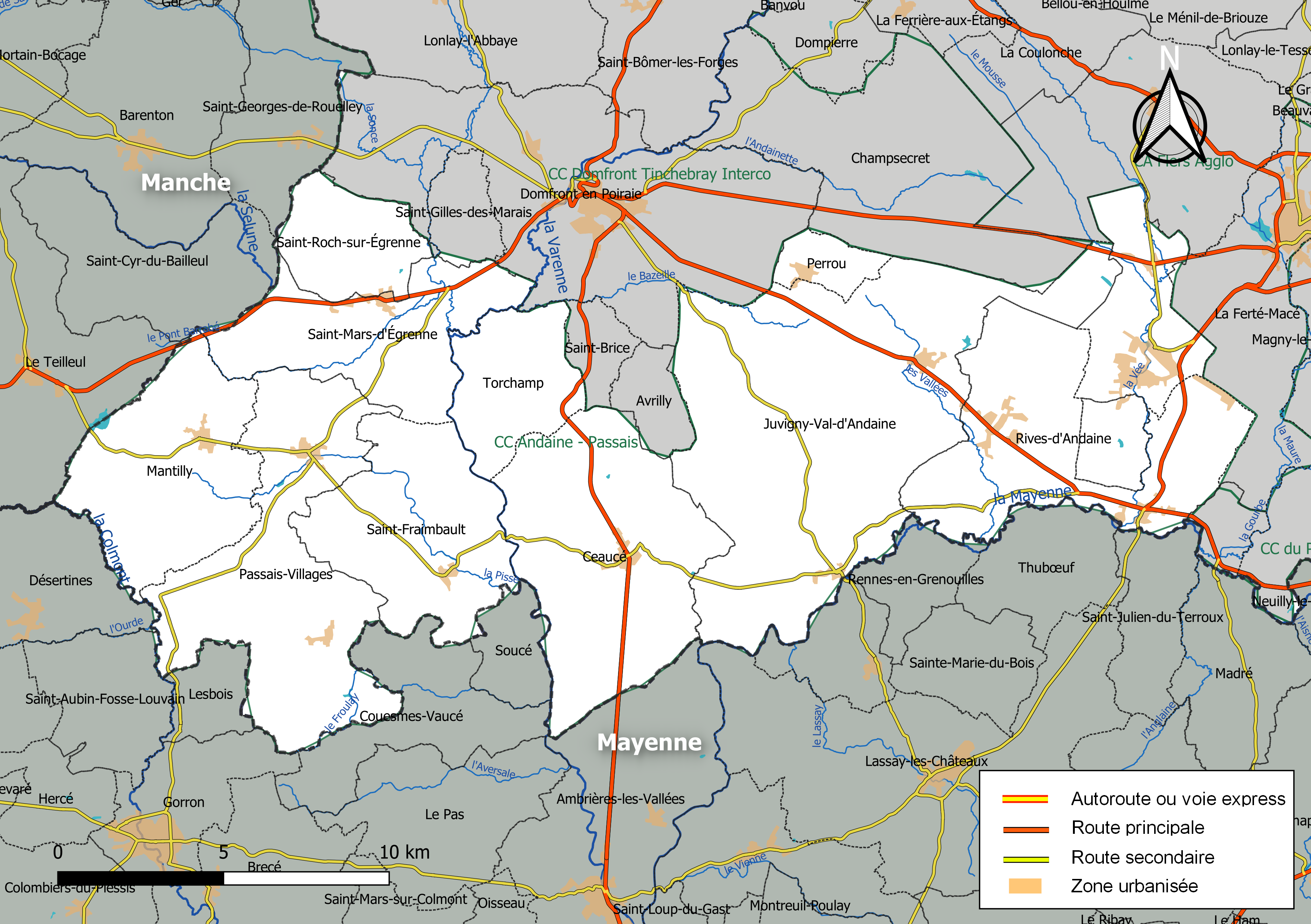 Carte géographique de la Communauté de communes Andaine - Passais, département de l'Orne, France. Composition au 1er janvier 2019.